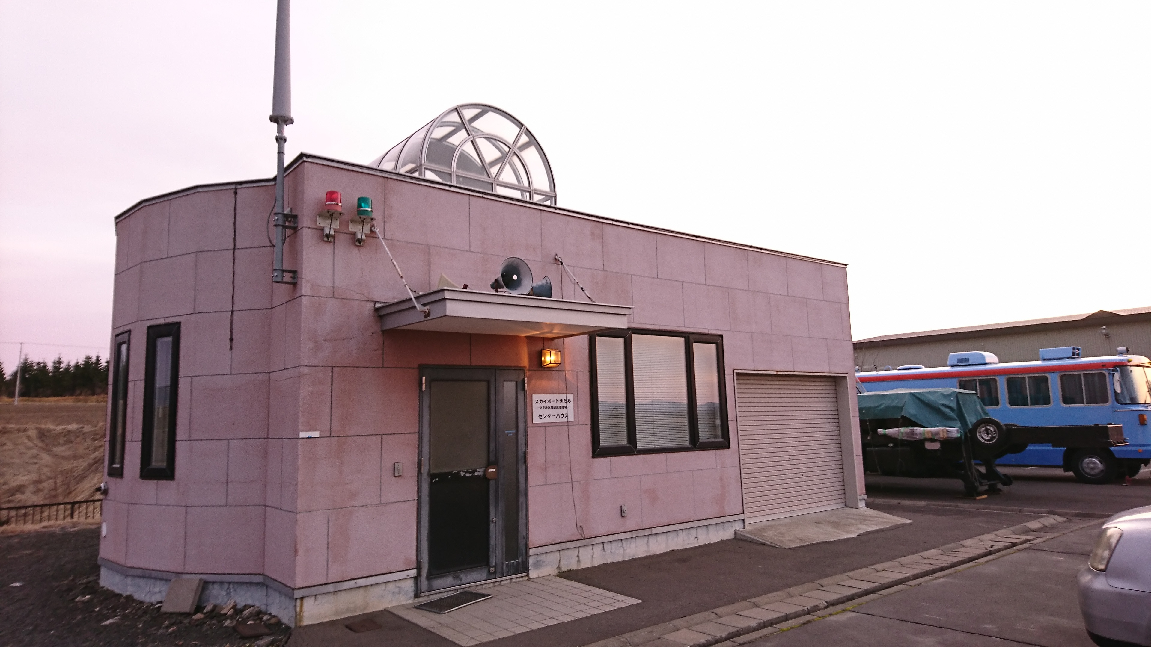 スカイポートきたみセンターハウス